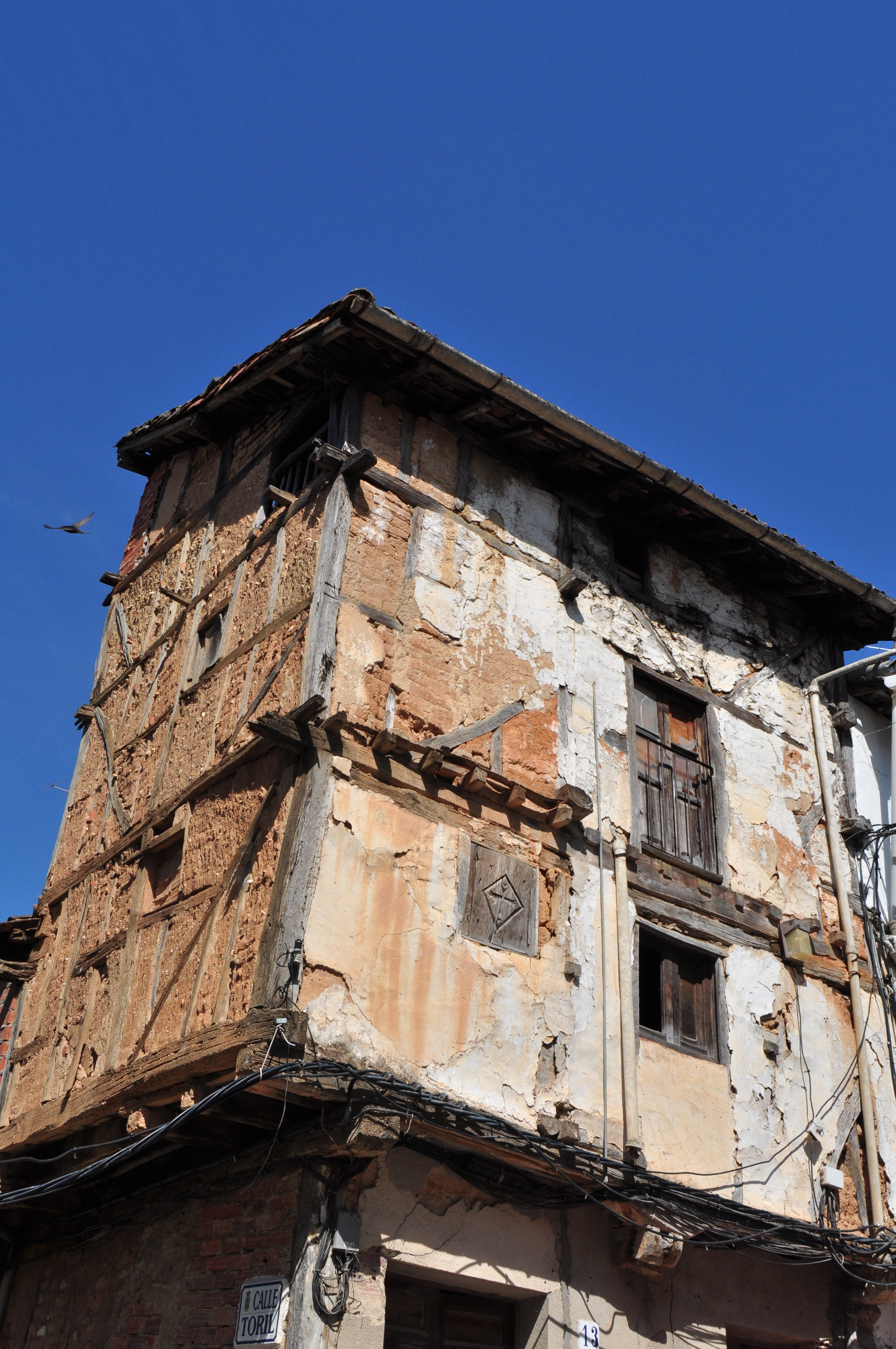 Aldeanueva de la Vera - 001